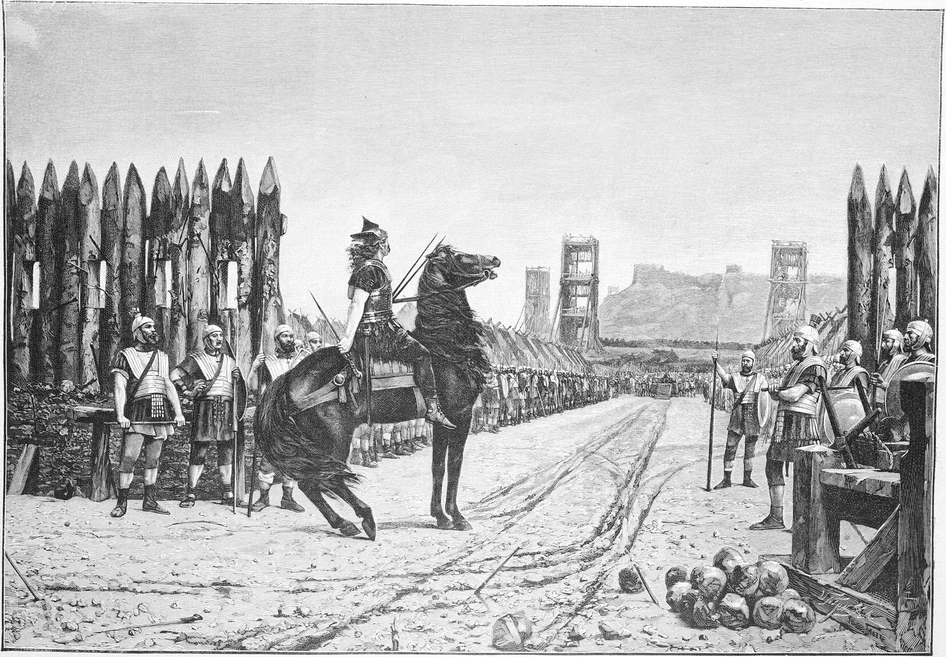 Vercingetorix se rend à César